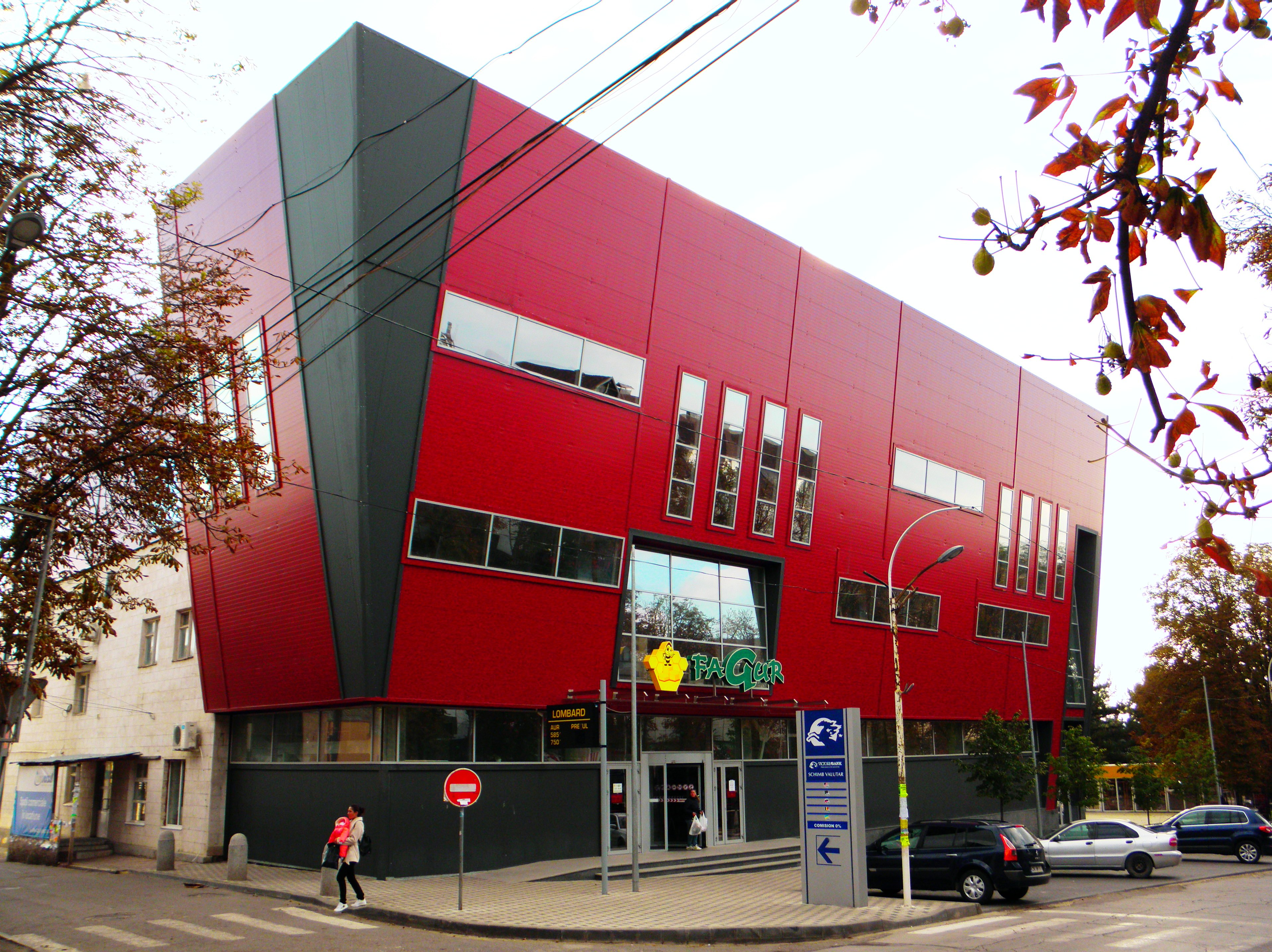 Сучасна архітектура Оргіїва